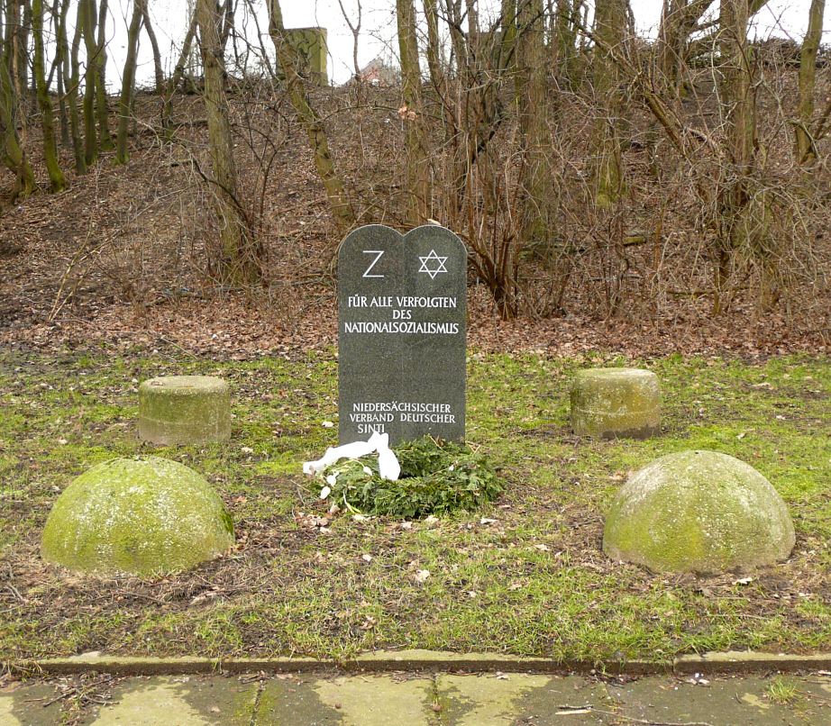 Gedenkstein für Deportierte vom Bahnhof Fischerhof in Linden